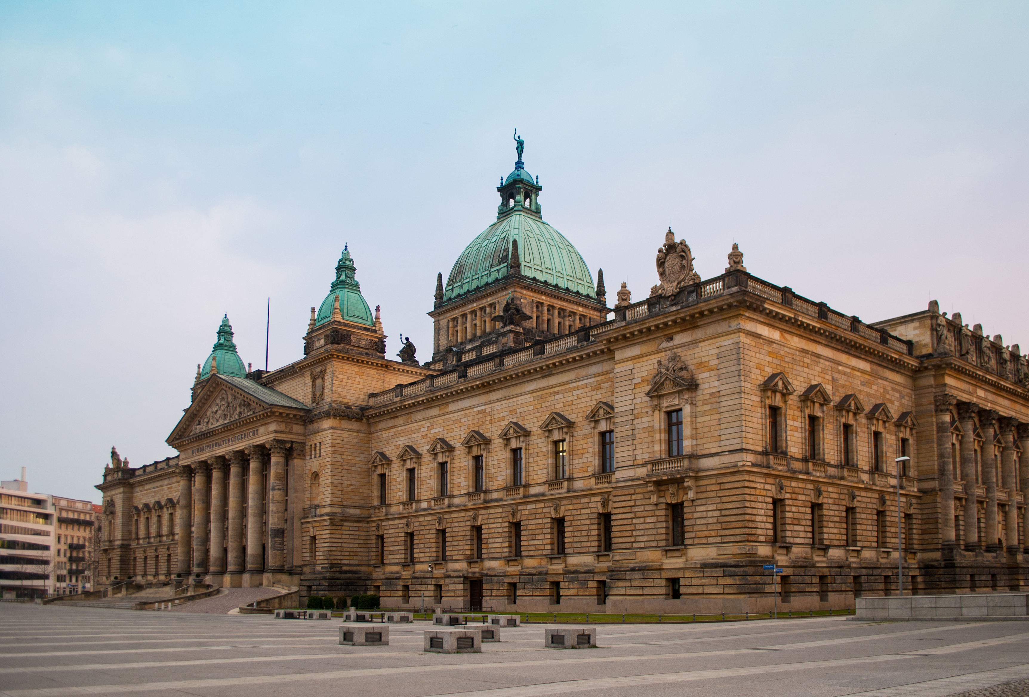 Reichsgerichtsgebäude in Leipzig. Simonplatz 1.